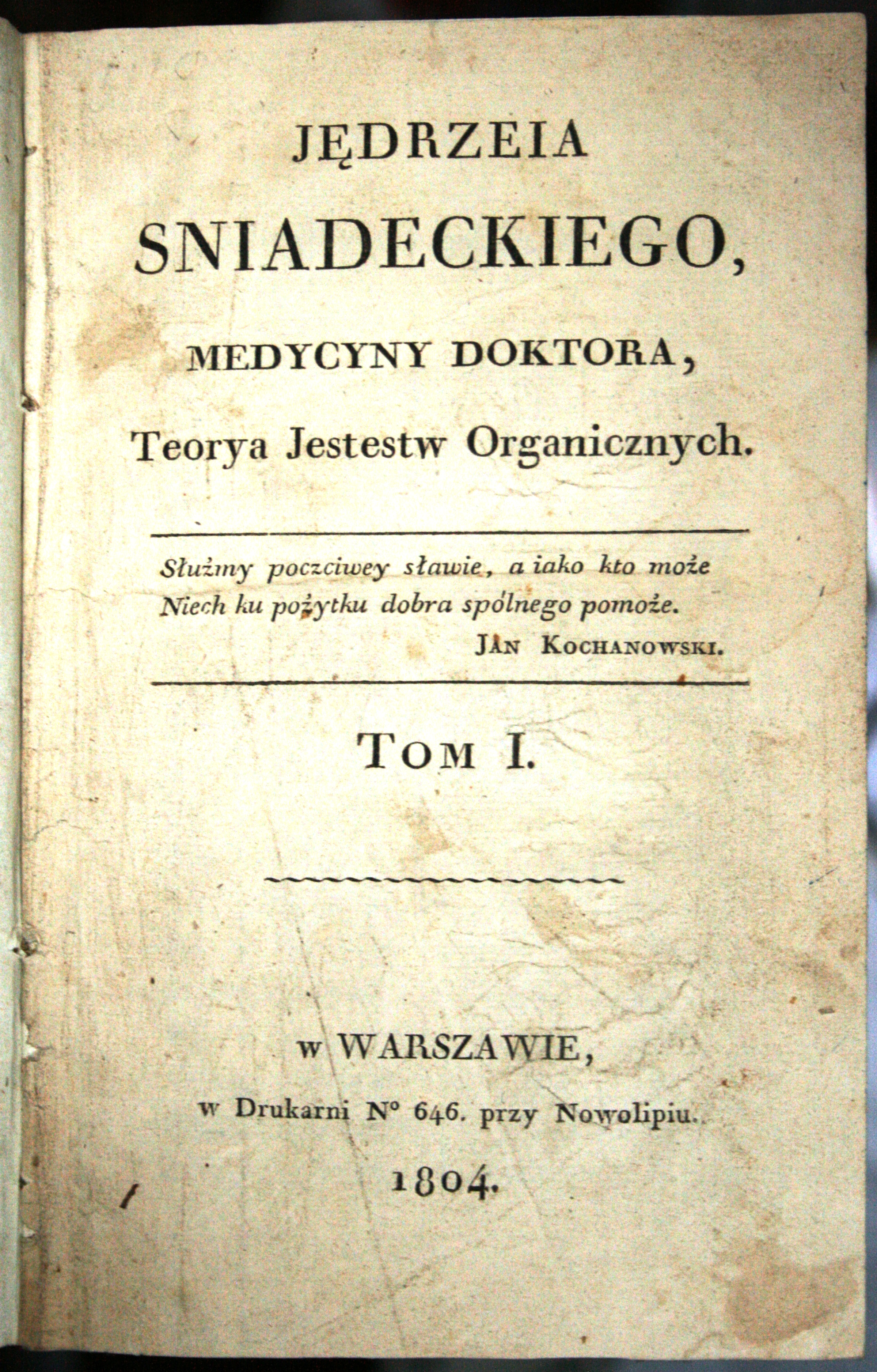 Śniadecki Jędrzej - Teorya jestestw organicznych - Tom I , strona tytułowa pierwszego wydania z 1804 roku